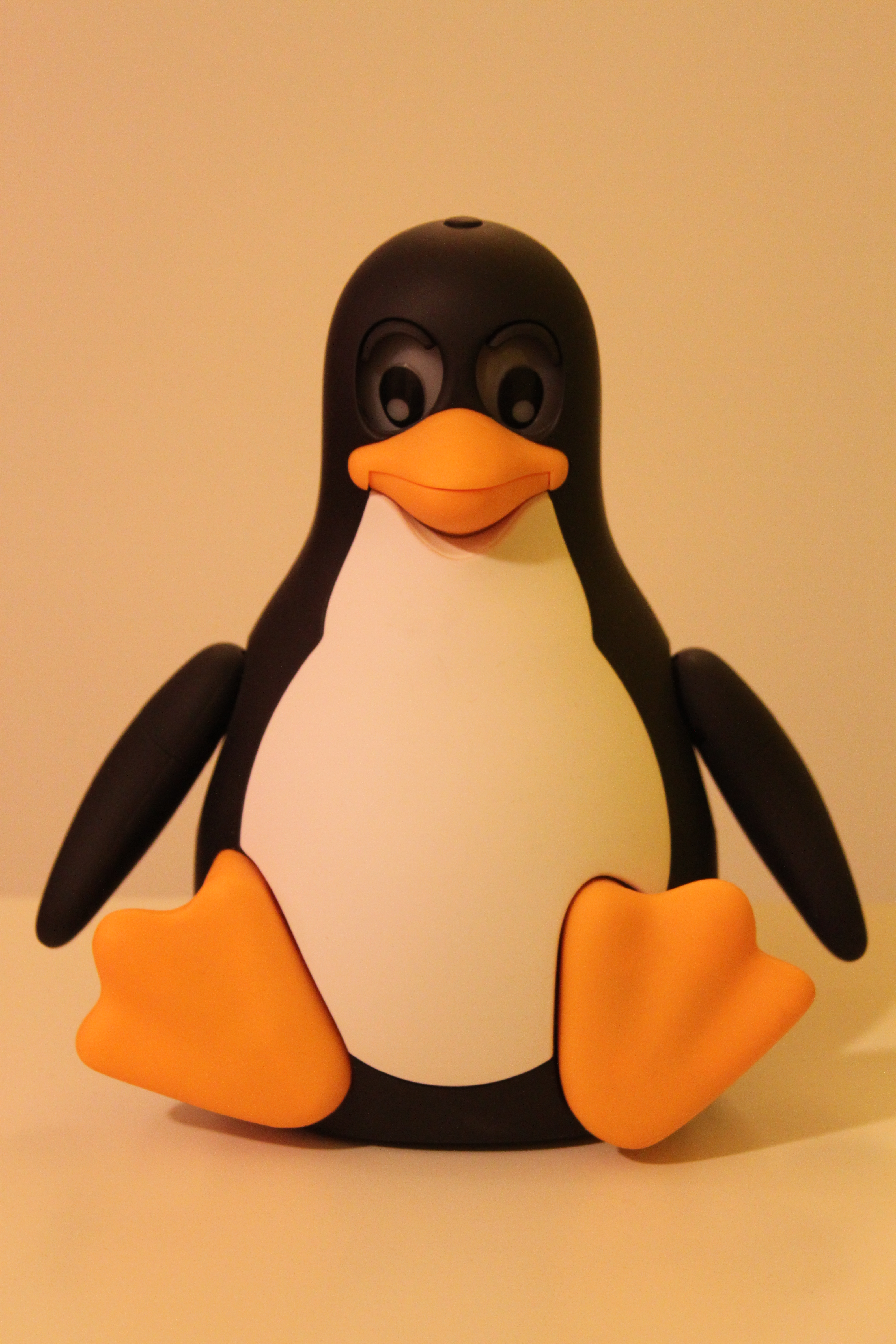 Tux Droid